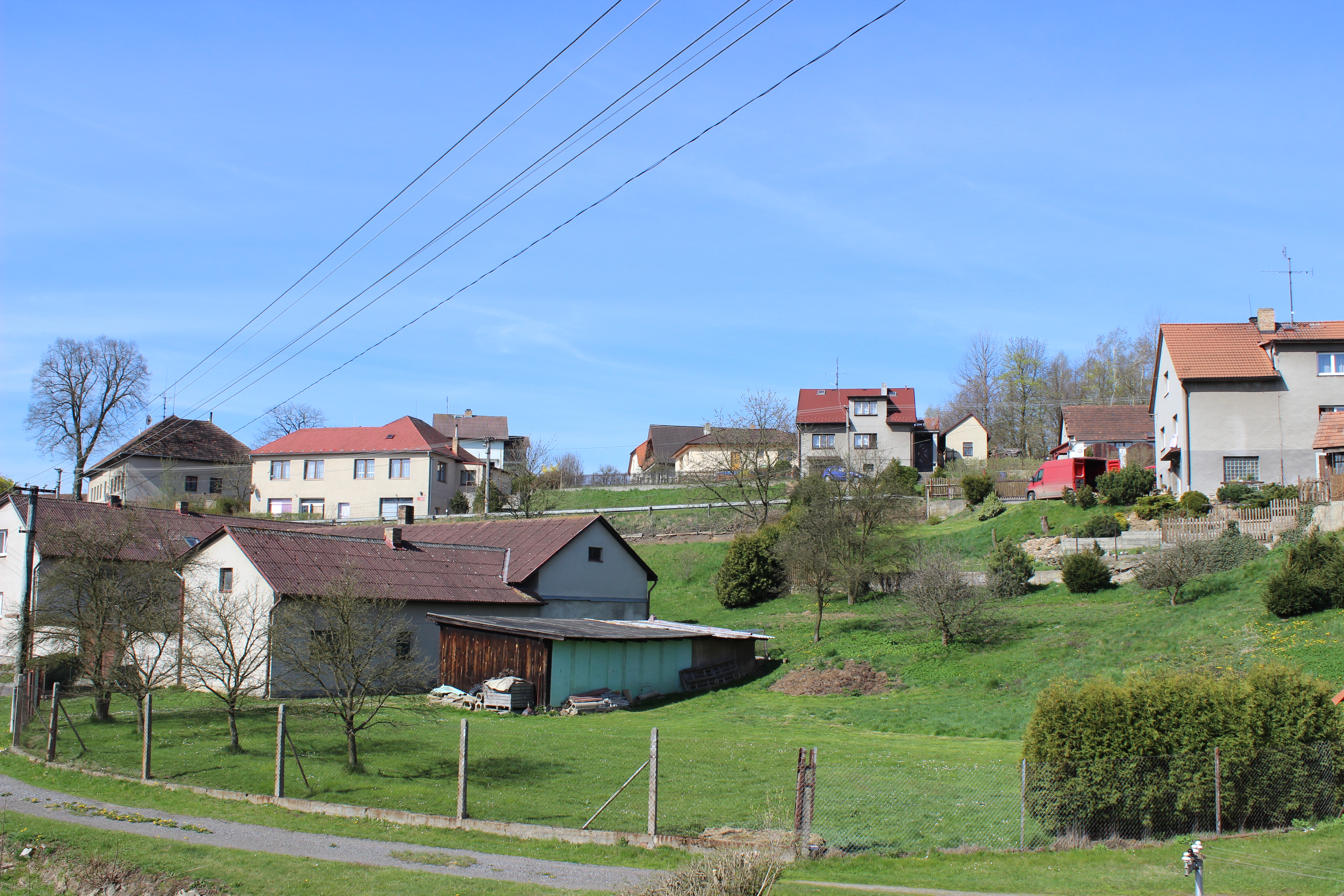 Zástavba v Zajíčkově při pohledu od železniční trati. Project: Fotíme Česko.